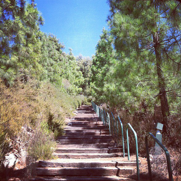 Амирим